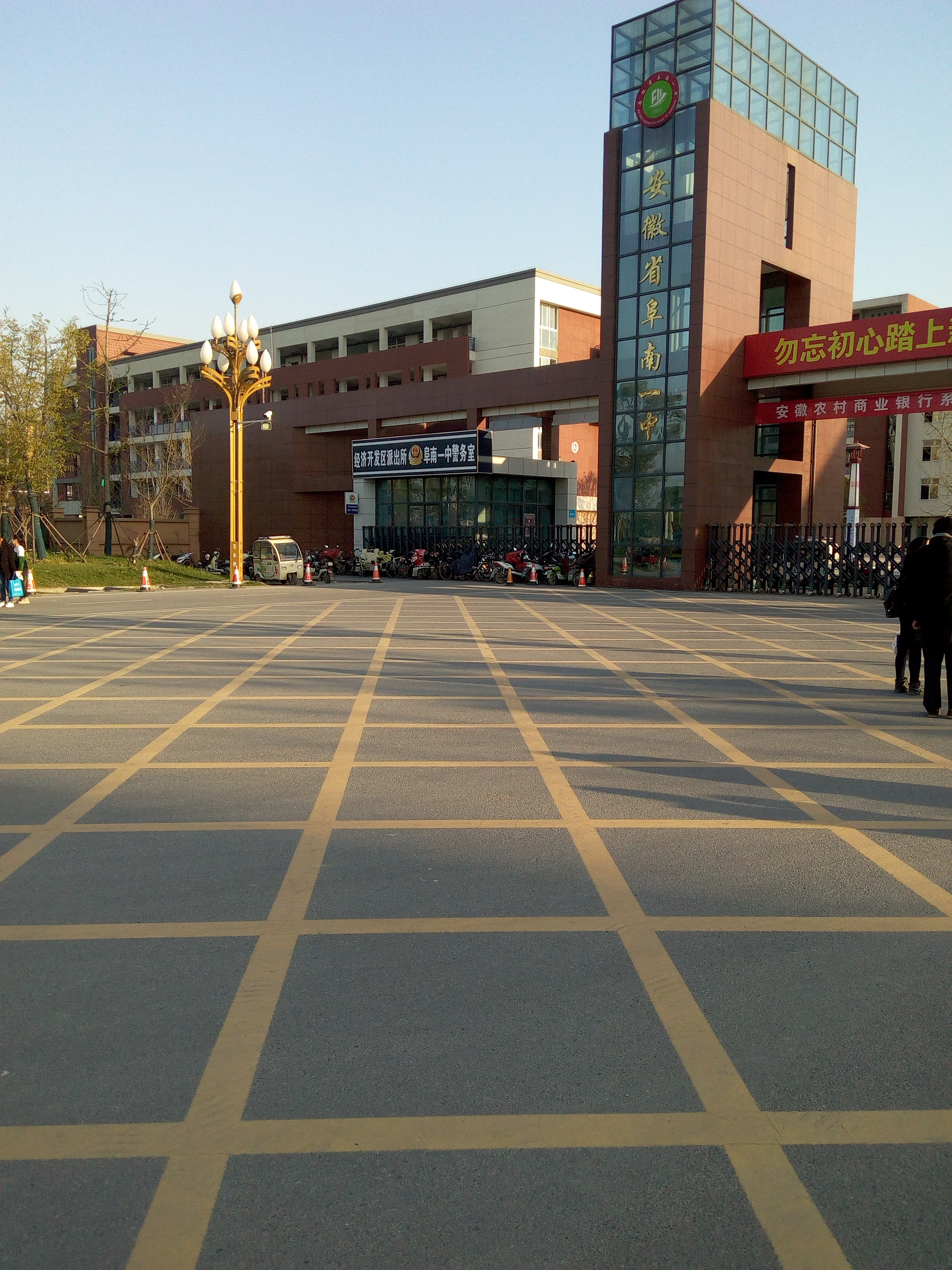 中文（中国大陆）: 阜南一中南大门